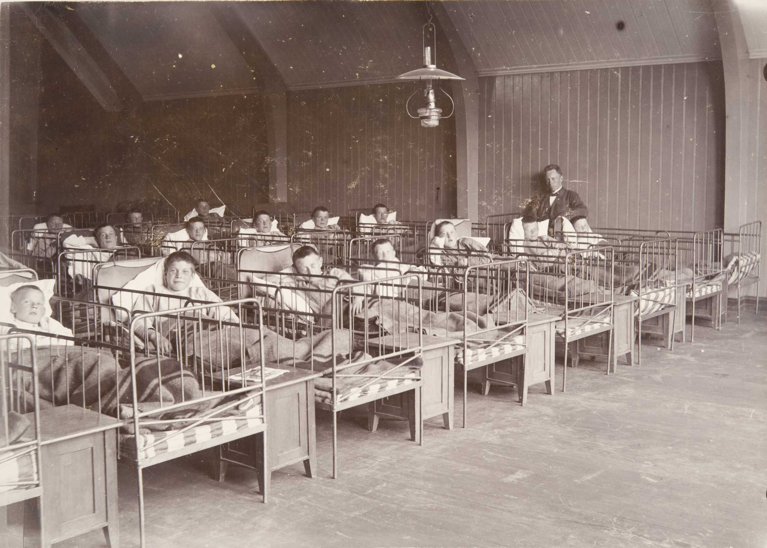 På sovesalen var det plass til inntil 30 gutter. Bildet er trolig fra 1903. Fotografene er Berg & Høeg, Horten.